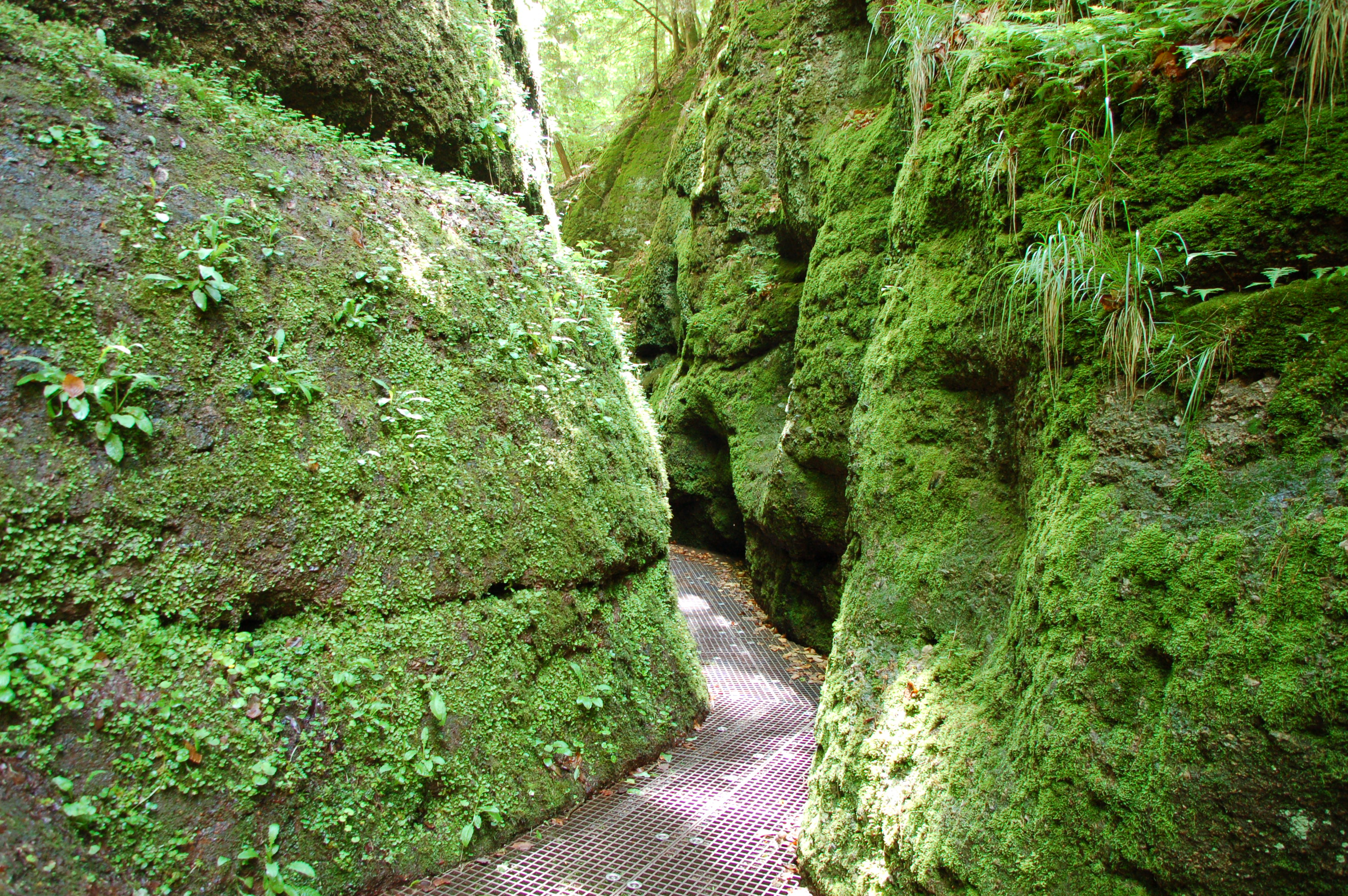 Weg durch die Drachenschlucht; NSG Wartburg–Hohe Sonne